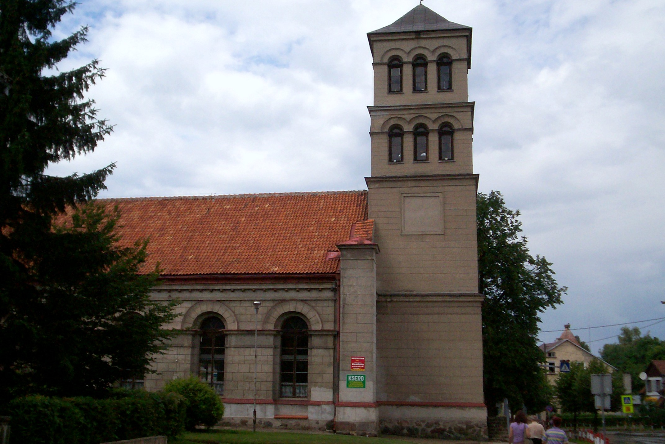 Biblioteka publiczna im. Korczaka w Dobrym Mieście (dawny kościół ewangelicki)